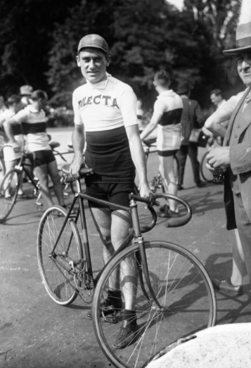 Longchamp : le 7ème Criterium des As : Henri Pélissier.